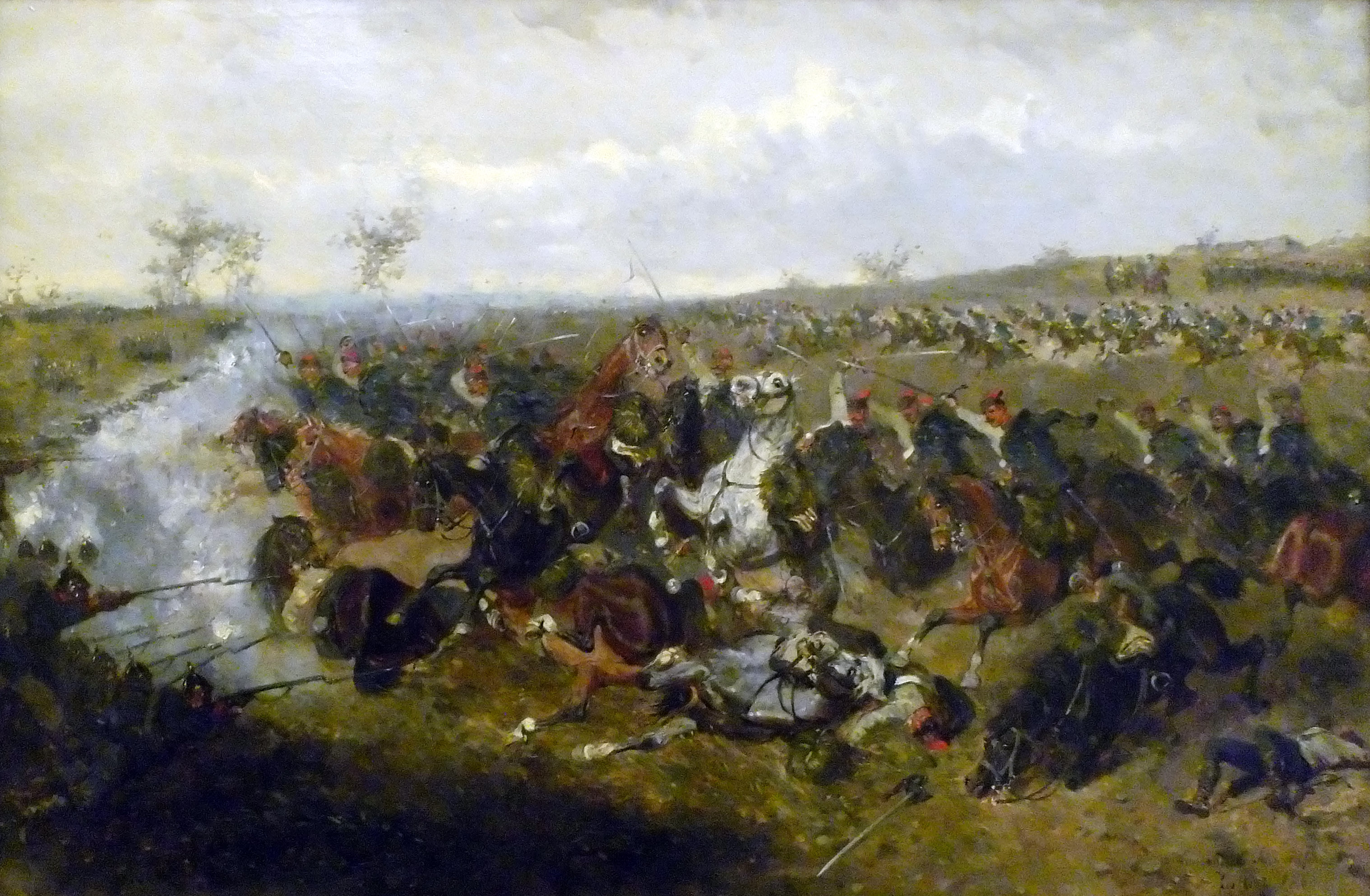 Battle of Schweinschädel.